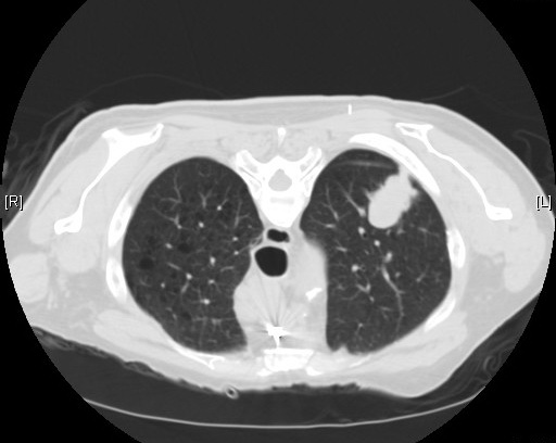 Adenocarcinoma - CT scan